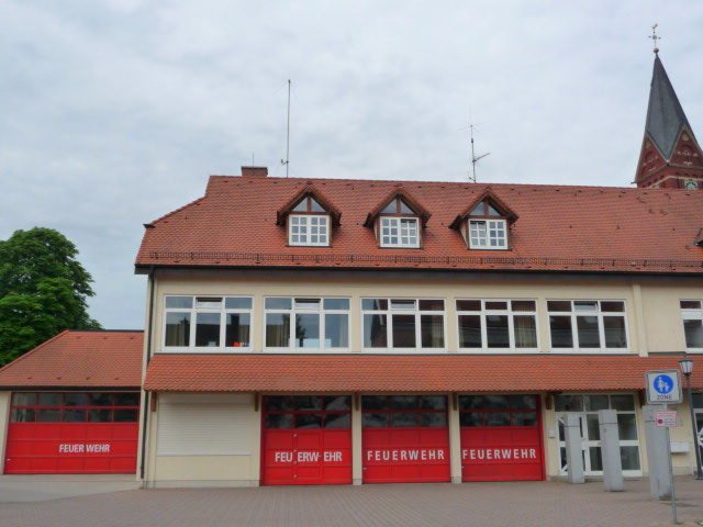 Gebäude der freiwilligen Feuerwehr in Plankstadt (Rhein-Neckar-Kreis, Deutschland)